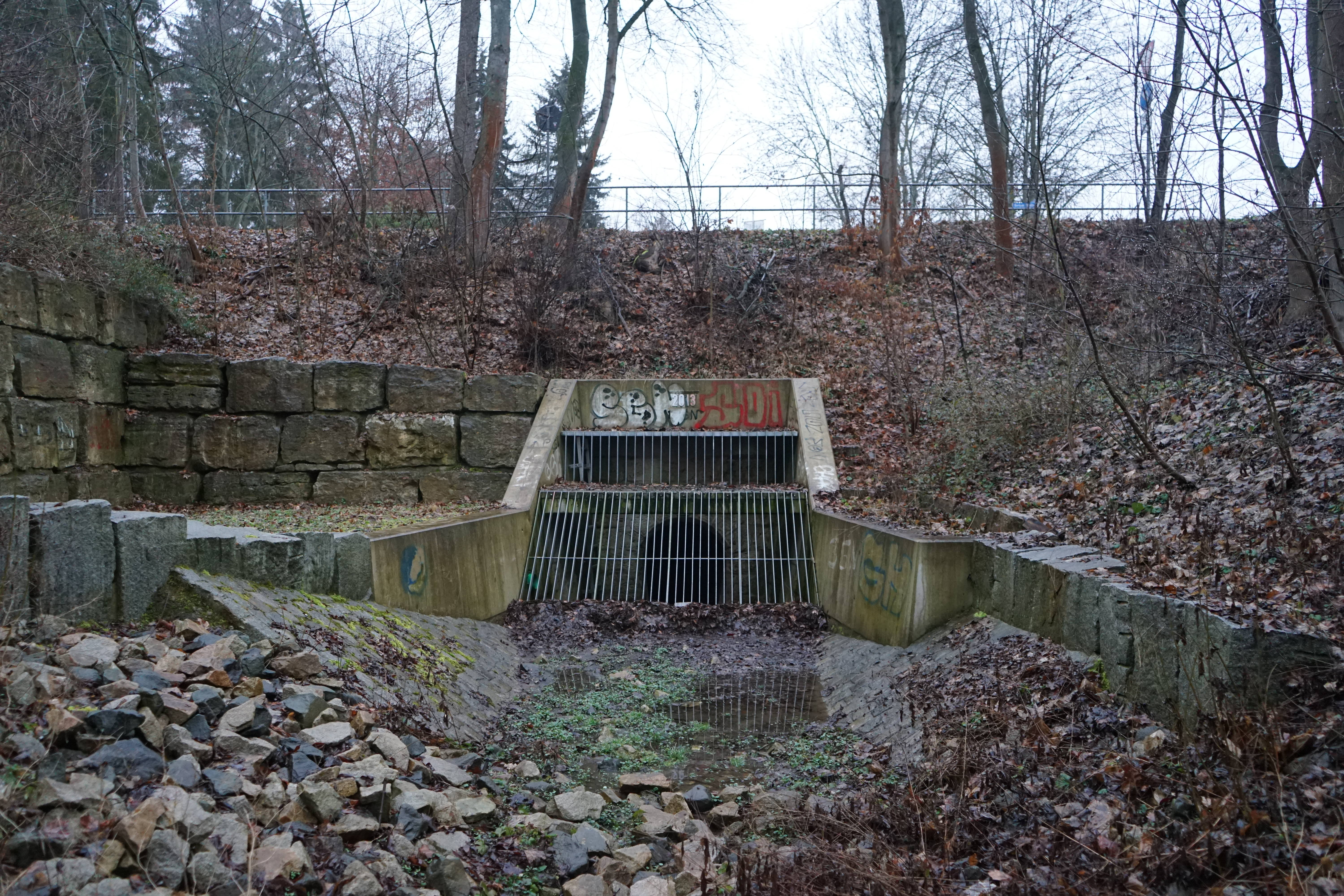 Der Wilde Graben fließt in die Verdolung an der Berkaer Straße Ecke Zum Wilden Graben